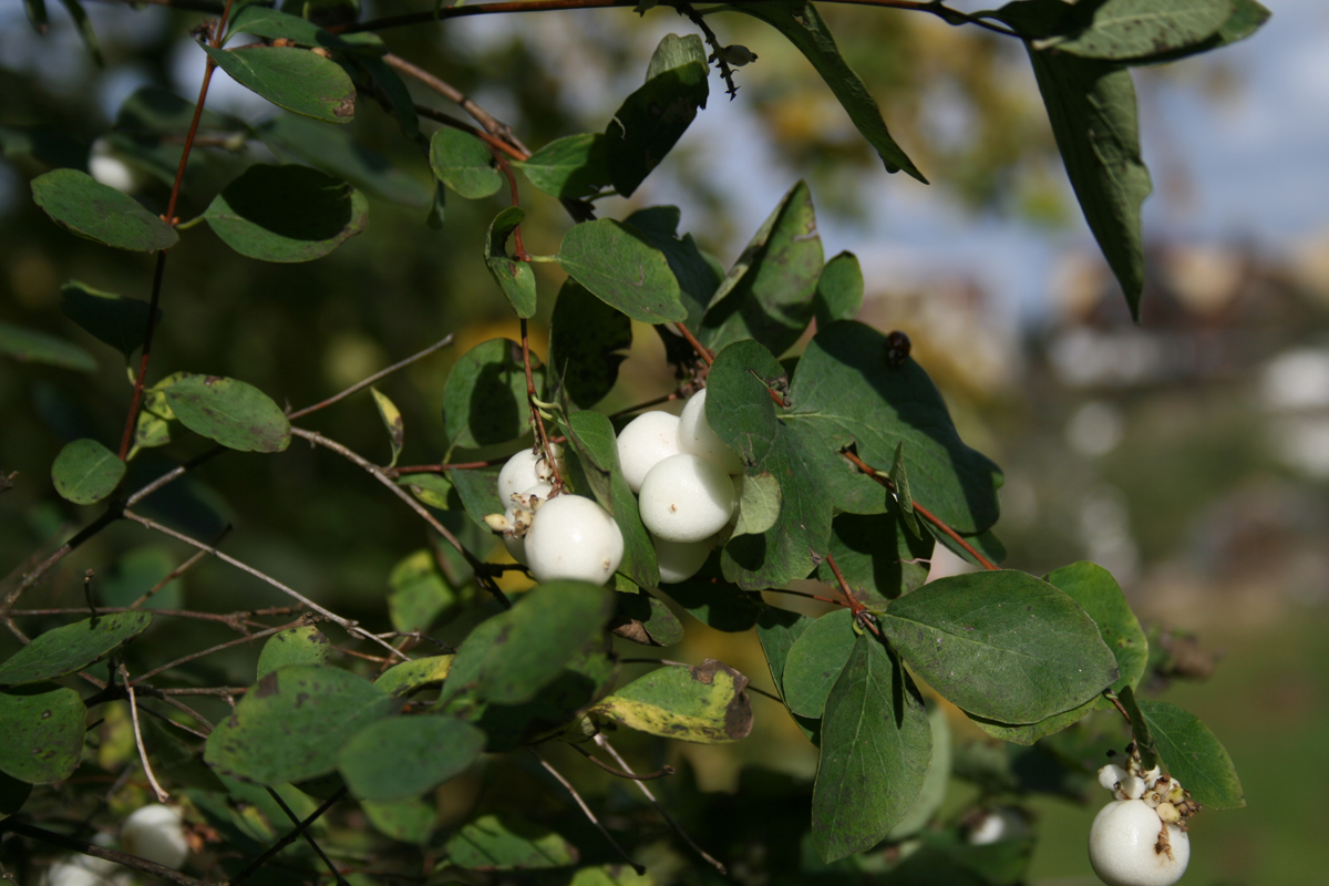 Symphoricarpos albus, east Bohemia, Europe Pámelník bílý, Jaroměř, východní Čechy Date=October 2007 Author=Karelj